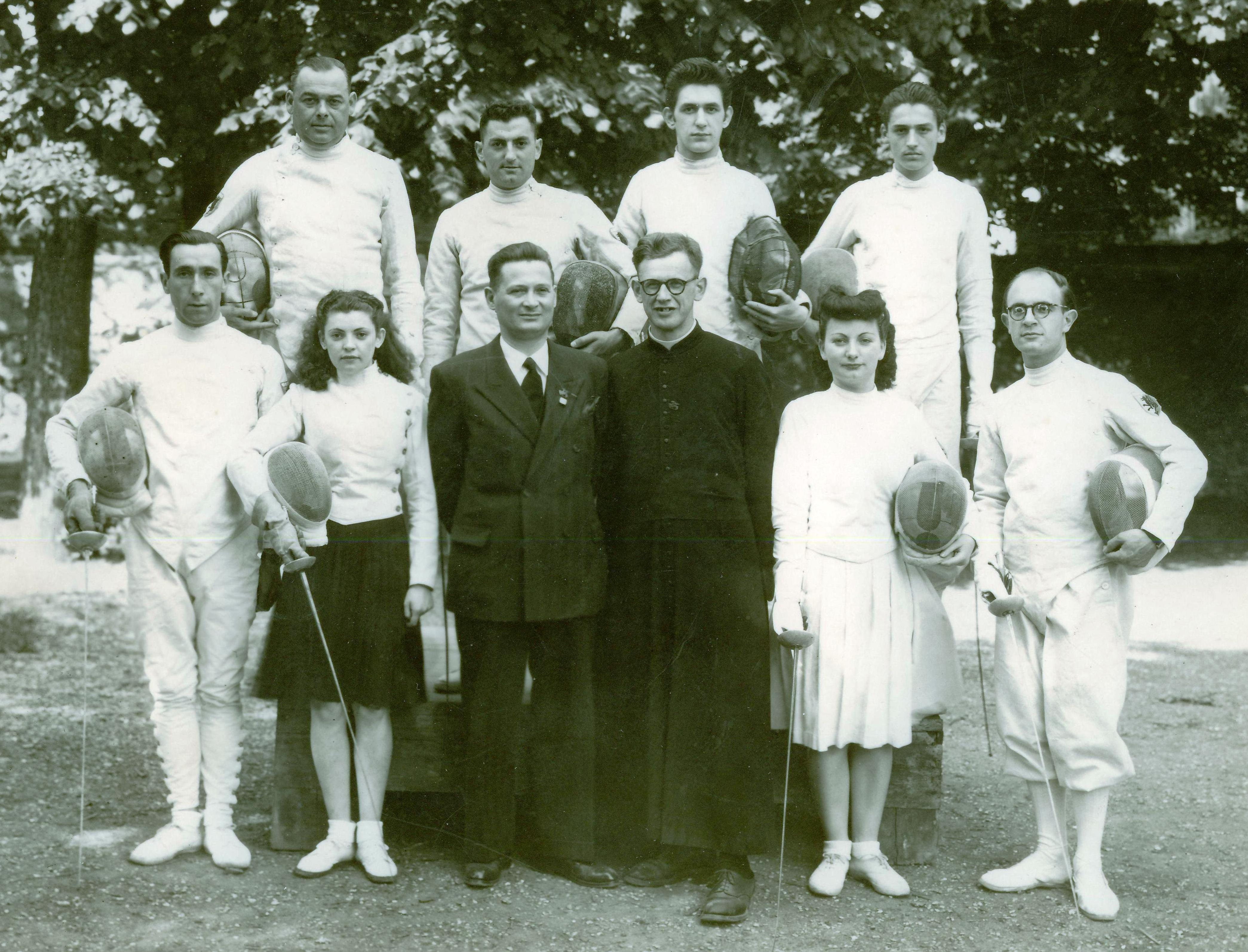 directeur et président d'un patronage entourés d'escrimeurs. Photo prise par mon père décédé dont je suis héritier